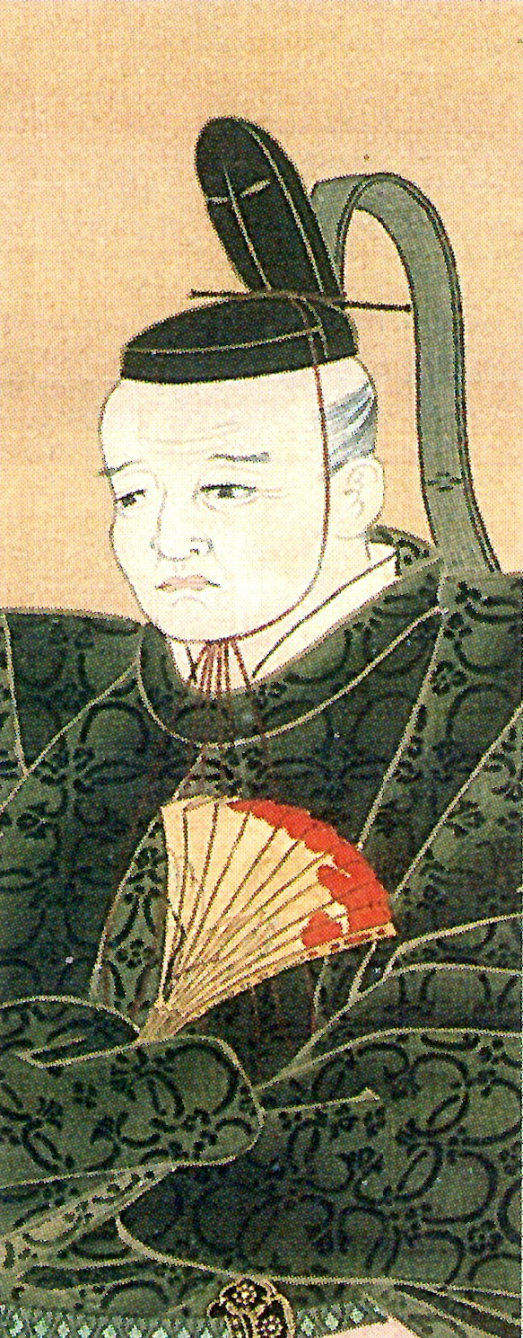 細川宣紀の肖像(部分)。